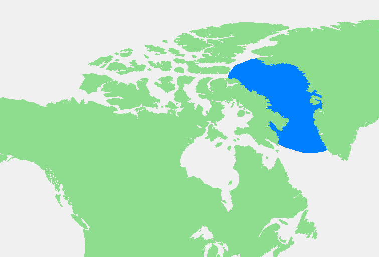 Baffinbaai.PNG